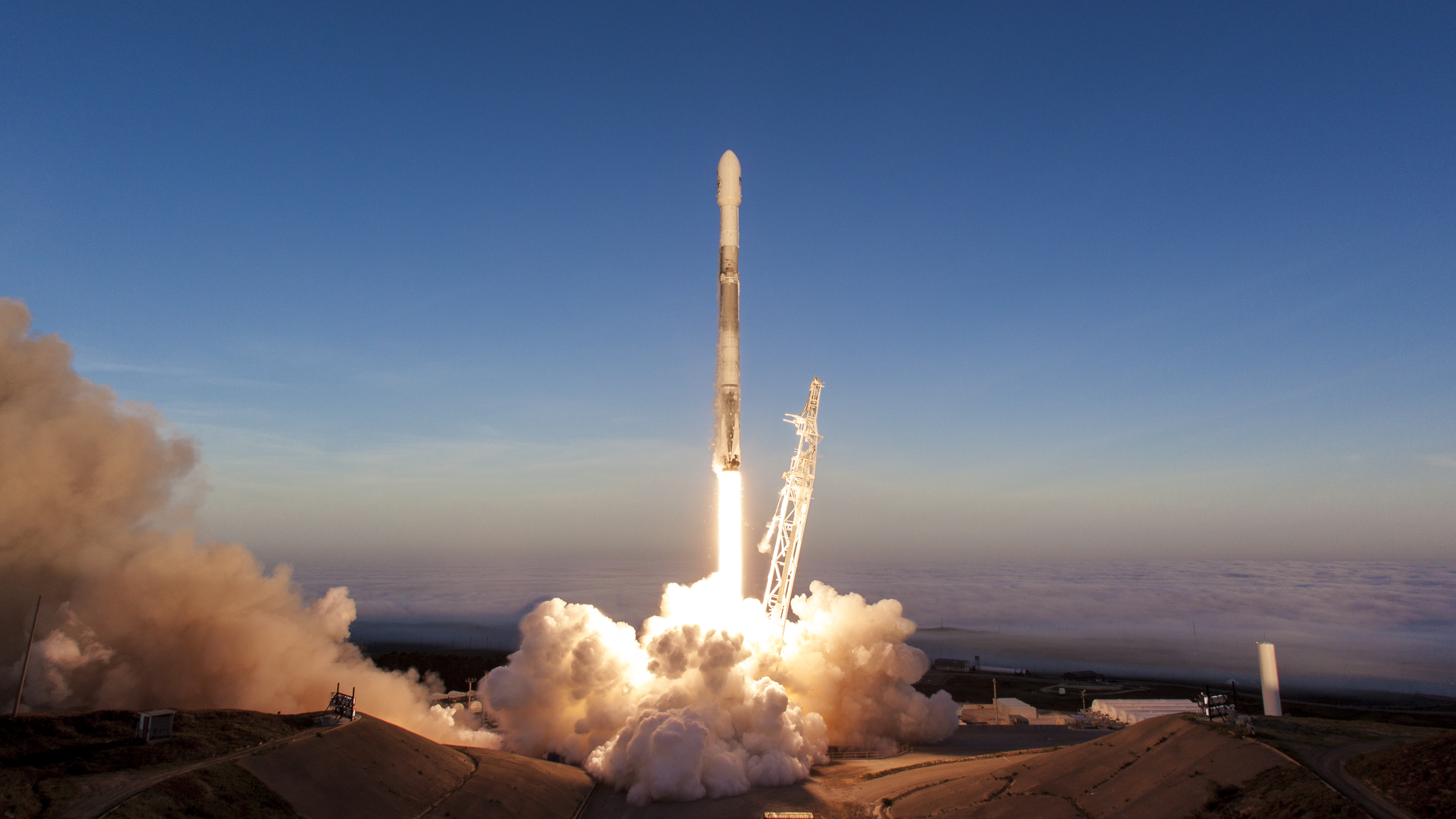 Iridium-5 Mission